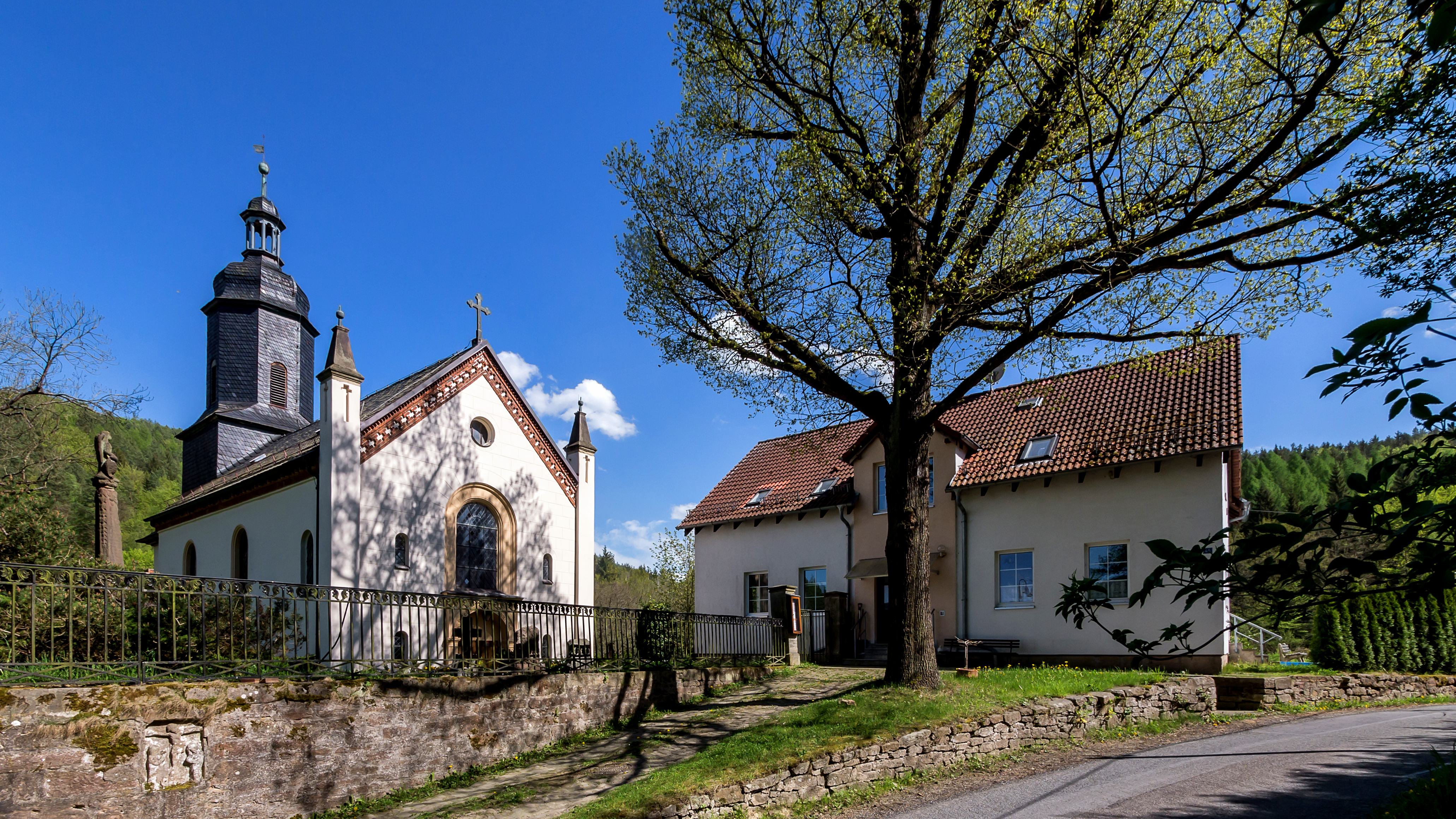 Friedebach Kirche